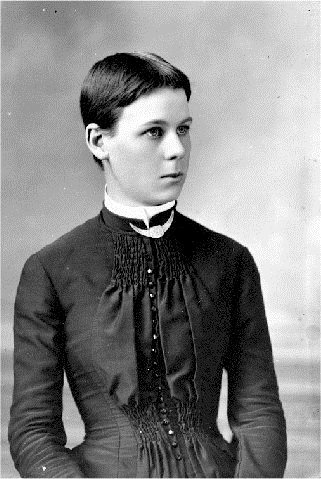 Agnes Deans Cameron